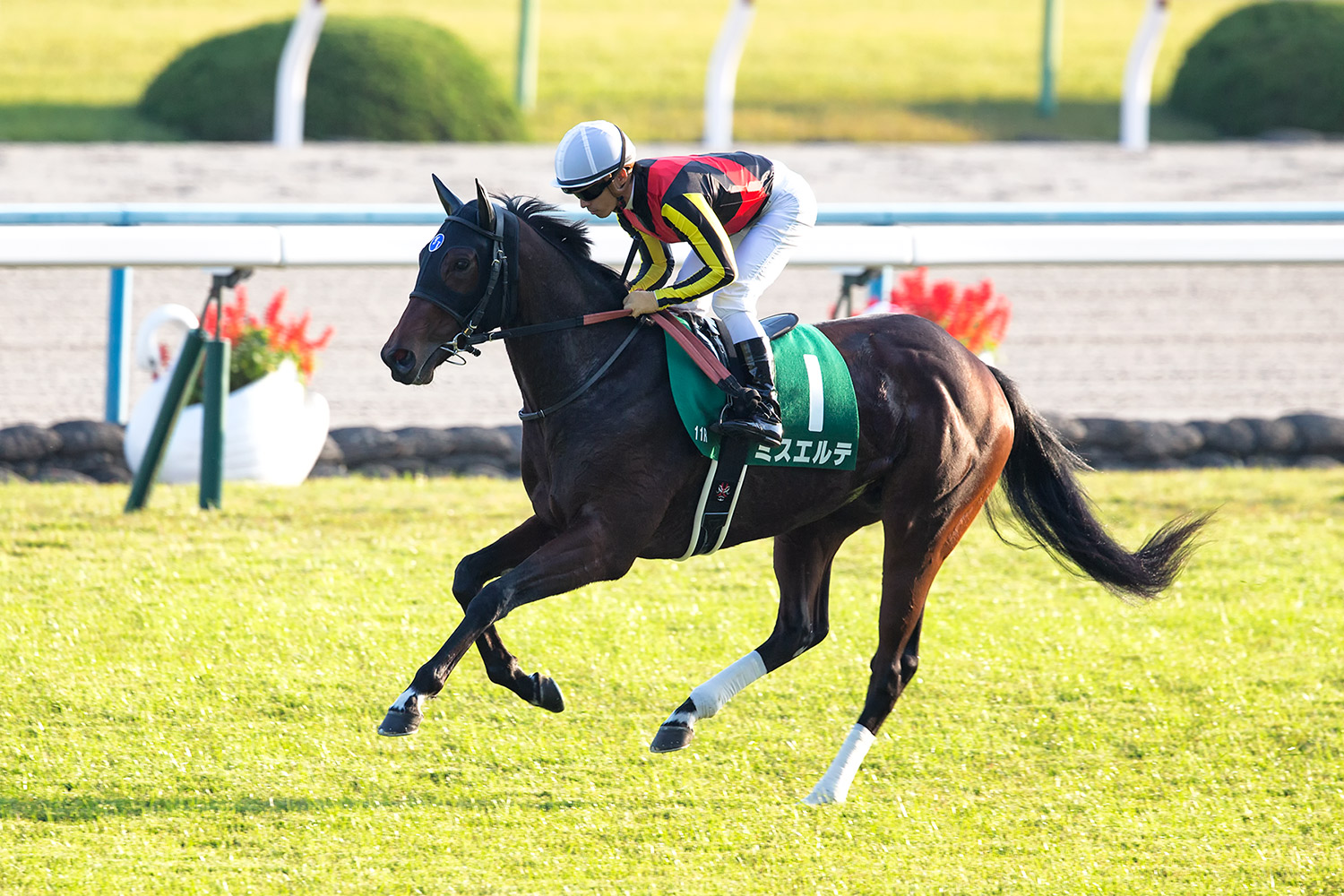 第21回 ＫＢＳ京都賞ファンタジーステークス(ＧＩＩＩ)